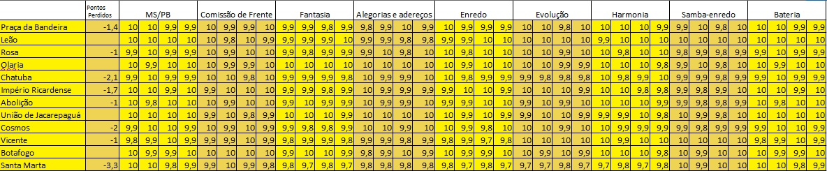 Resultados do Carnaval do Rio em 2019 - Grupo D